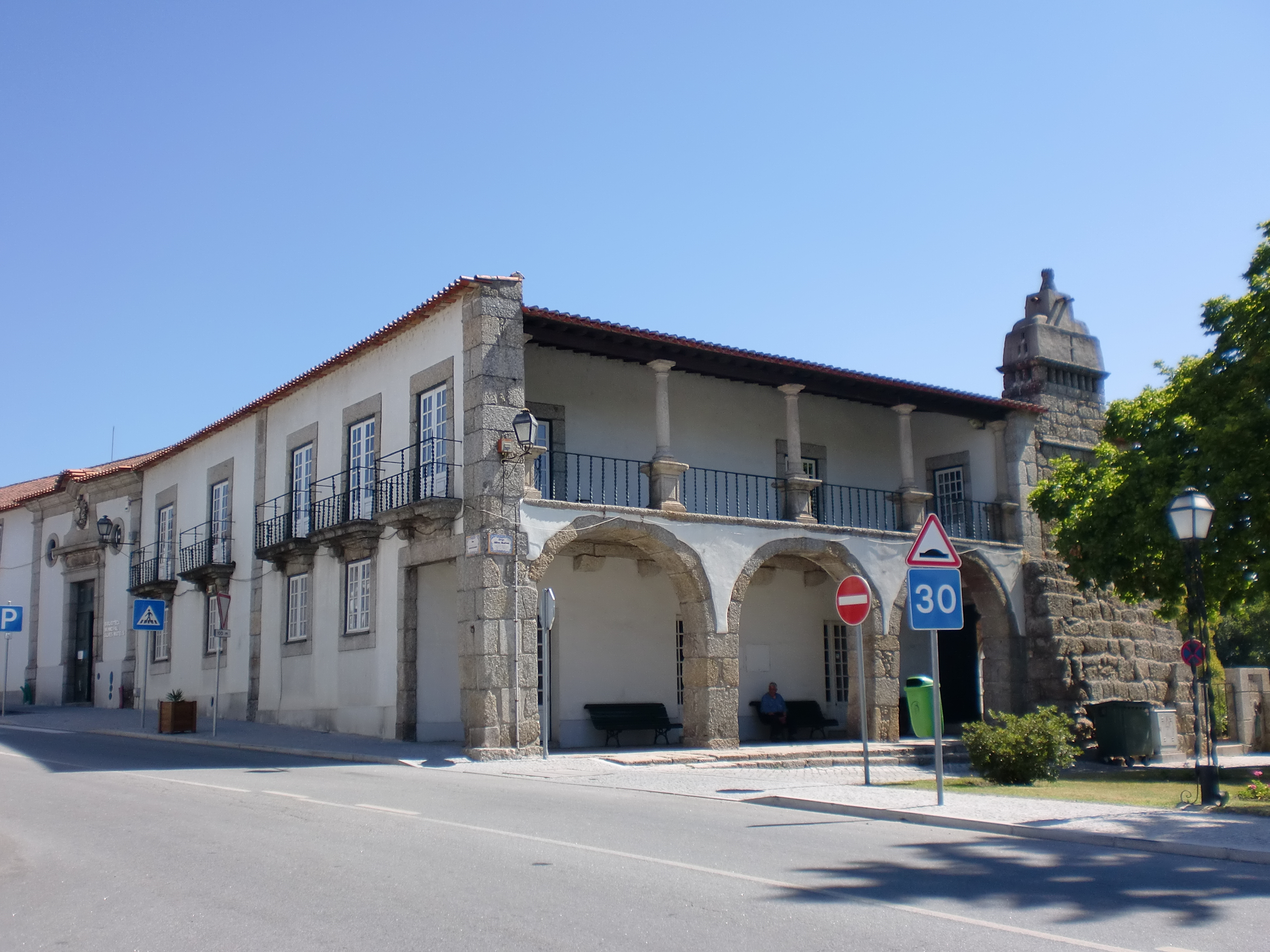 Casa dos Arcos em Santa Comba Dão.